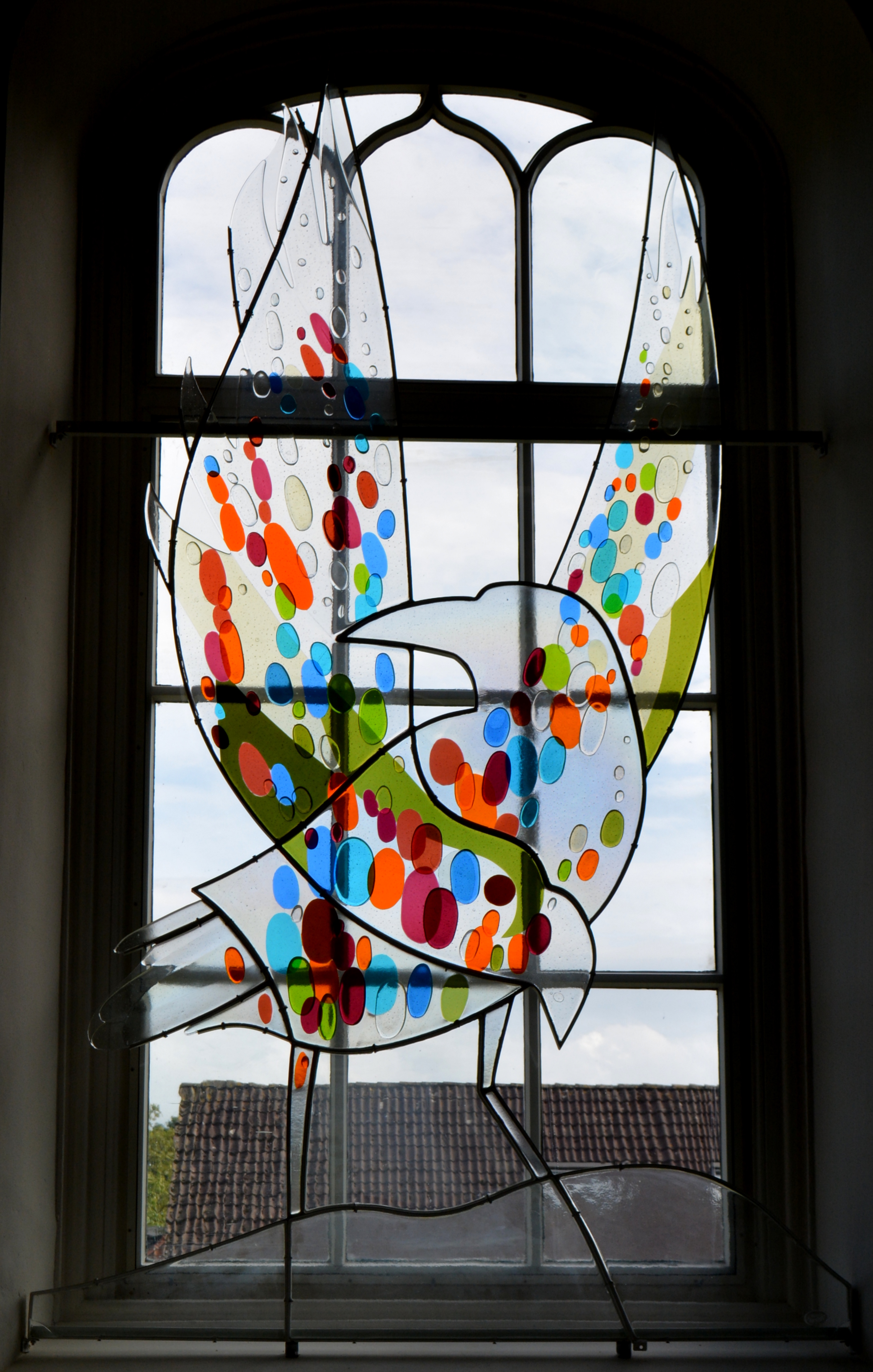 Reduzum, Vincentiustsjerke, Vincentiusraam